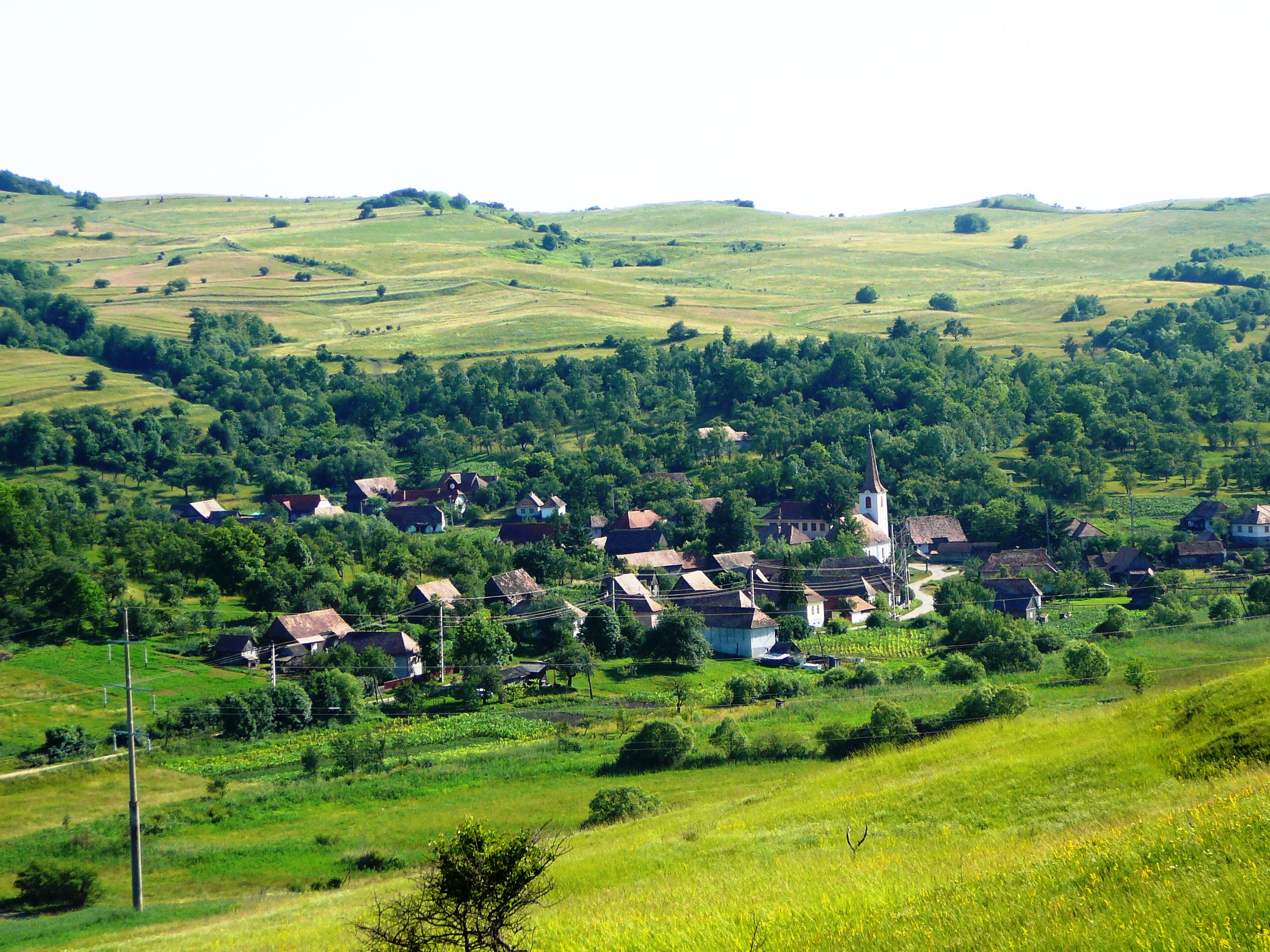 Szekelyszentmikos